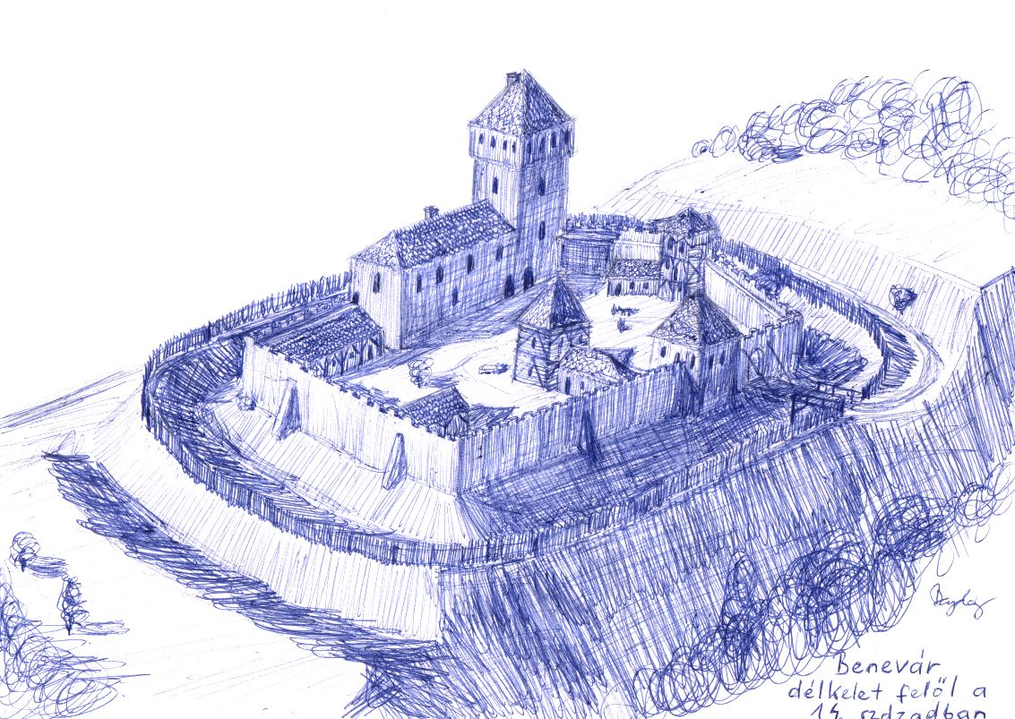 A Mátrafüredhez közeli Benevár rekonstrukciós rajza a 14. századi állapotnak megfelelően délkeleti irányból nézve